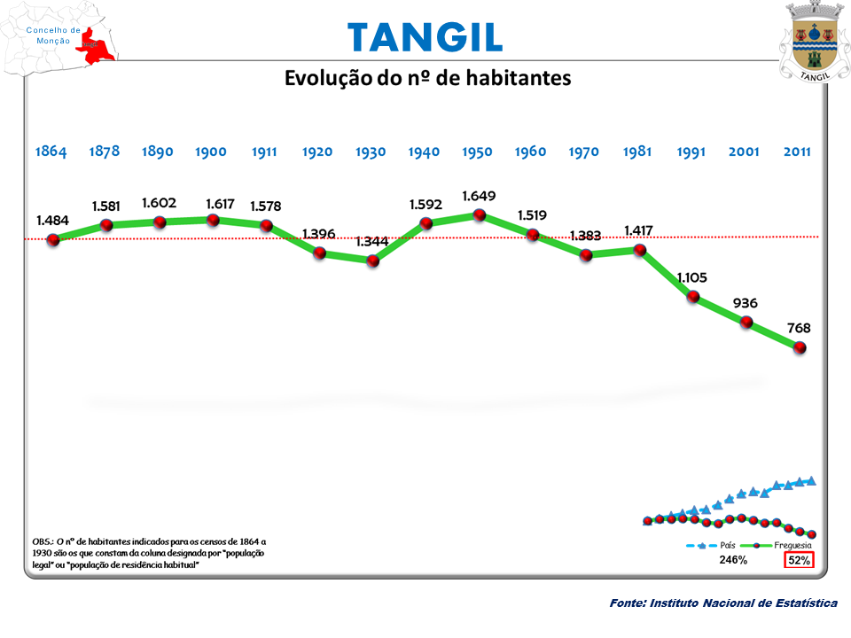 Censos 1864/2011